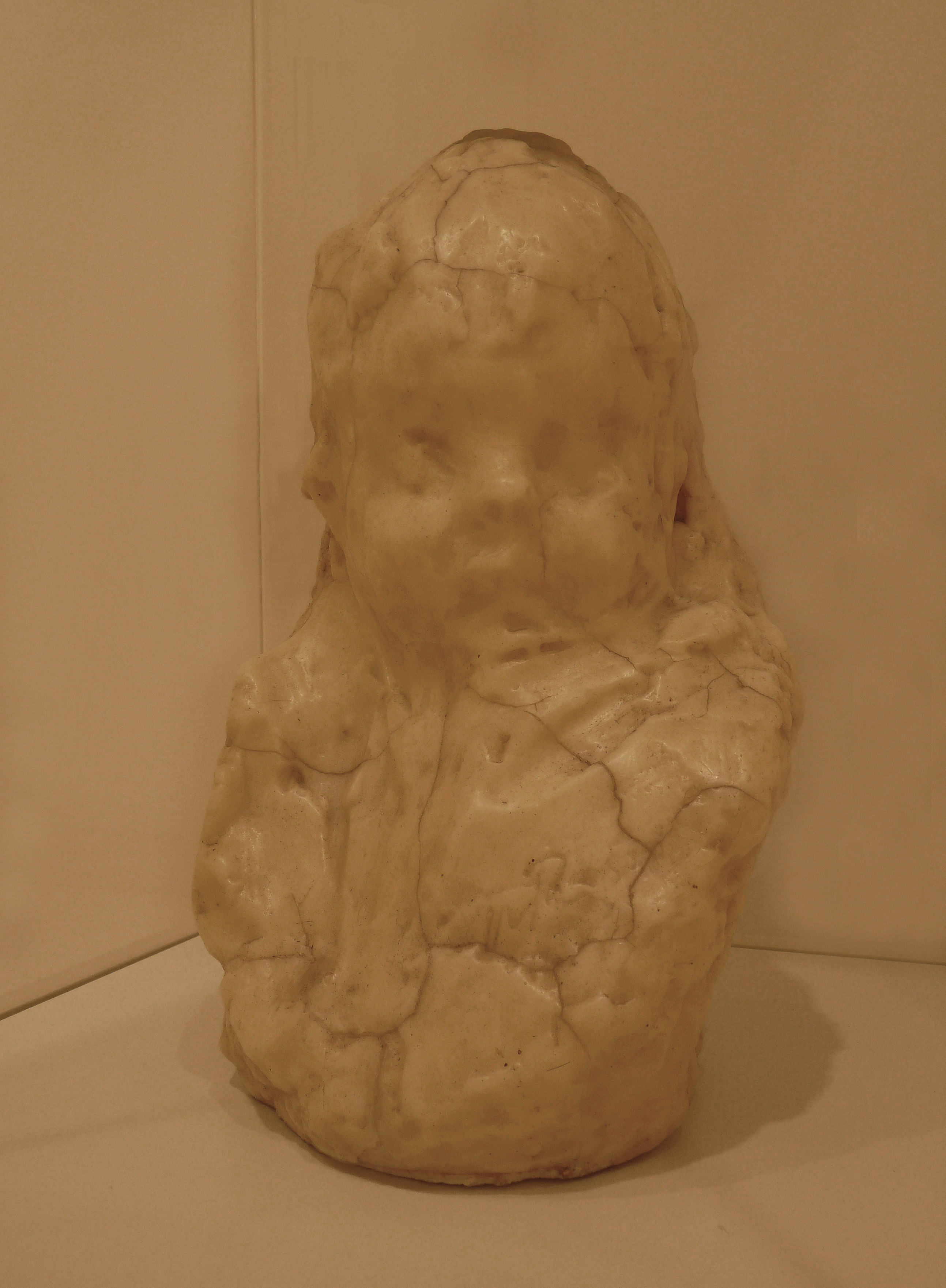 Medardo Rosso, L'enfant au soleil, cire sur plâtre, Musée d'art moderne et contemporain de Strasbourg.